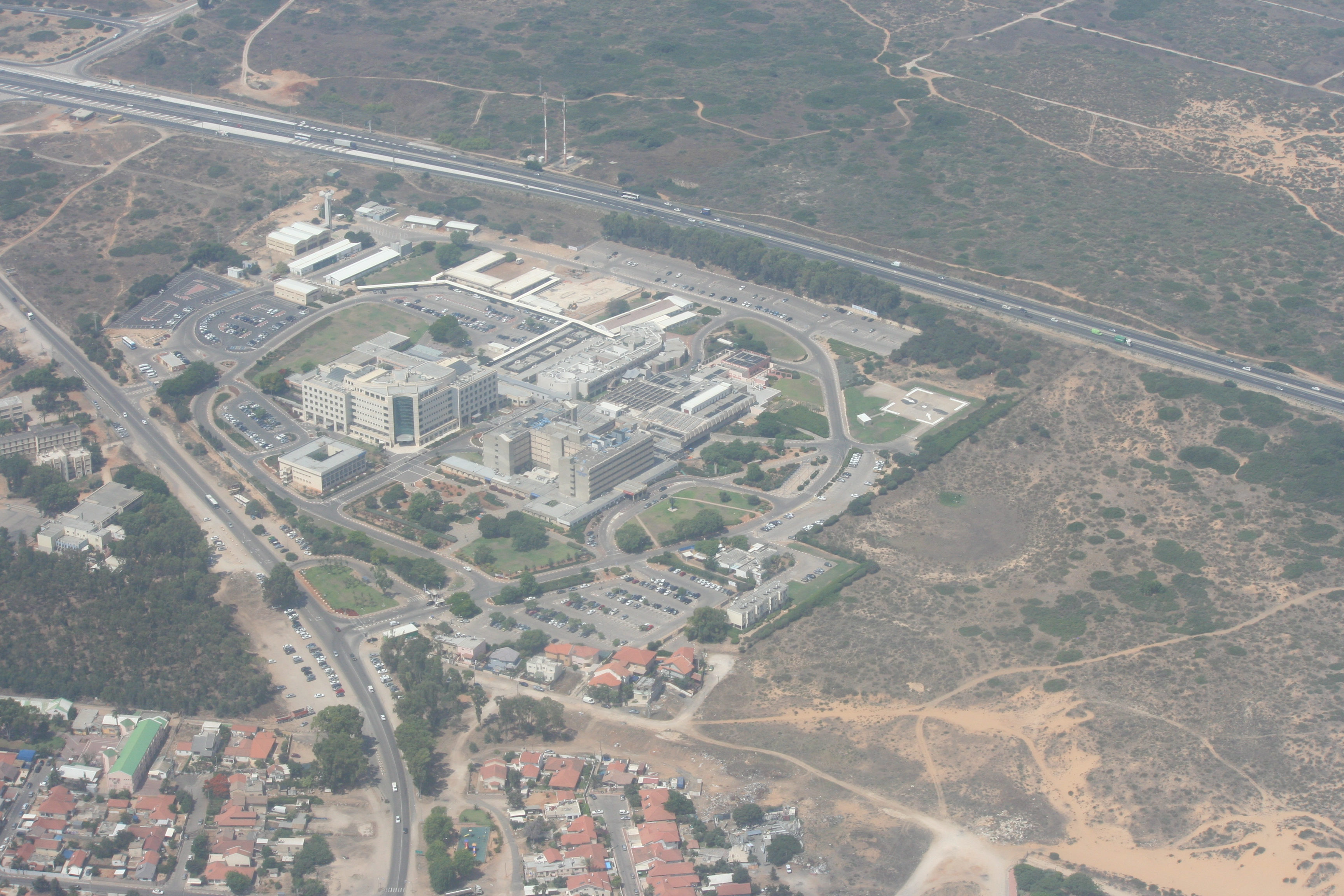 המרכז הרפואי הלל יפה בחדרה וכביש החוף